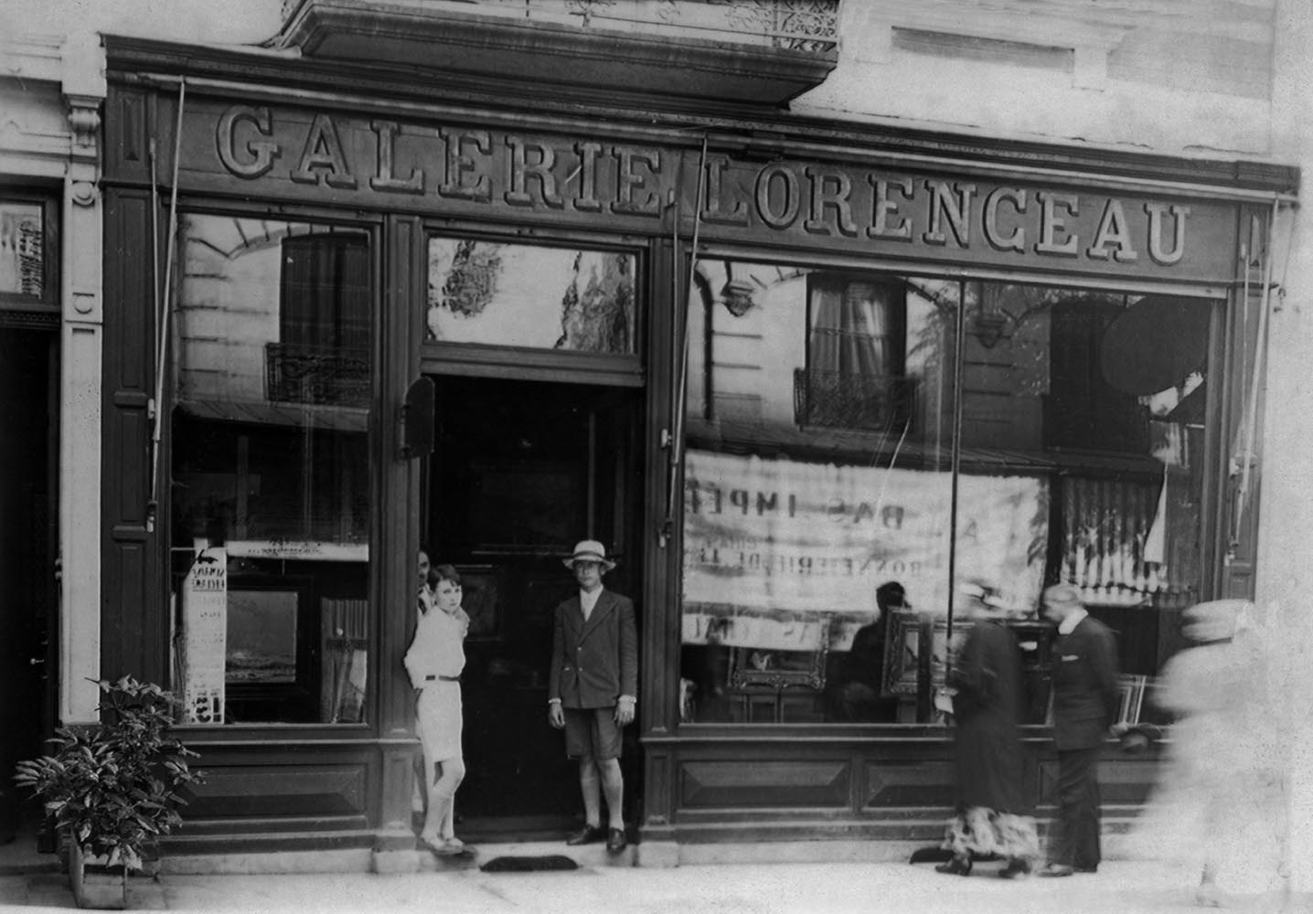 Galerie Lorenceau à Vichy (Allier, France).